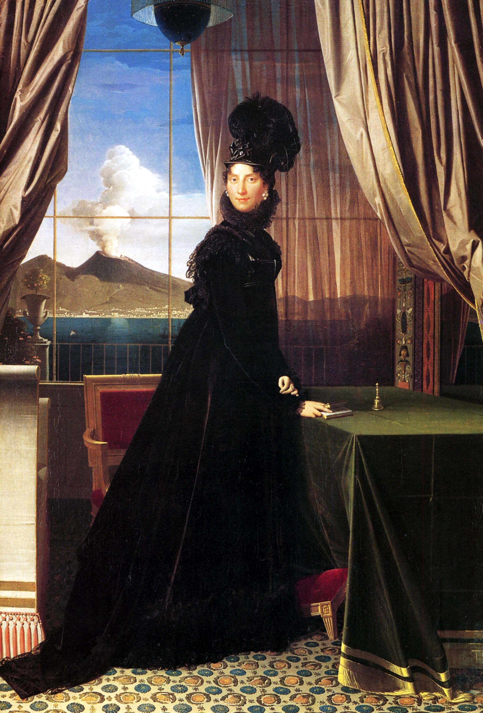 Portrait de Caroline Murat reine de Naples